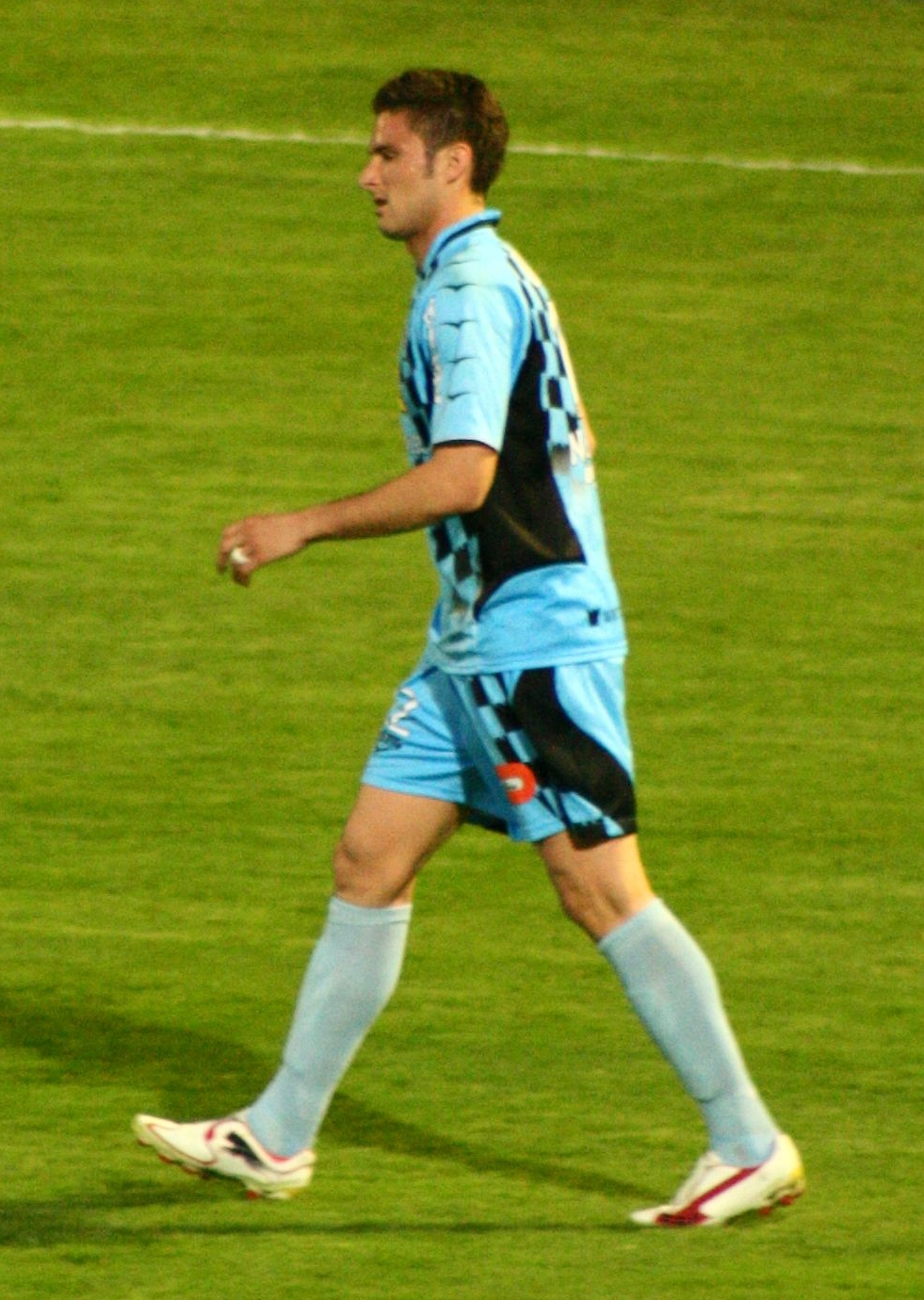 Olivier Giroud sous les couleurs du Tours FC face au SM Caen